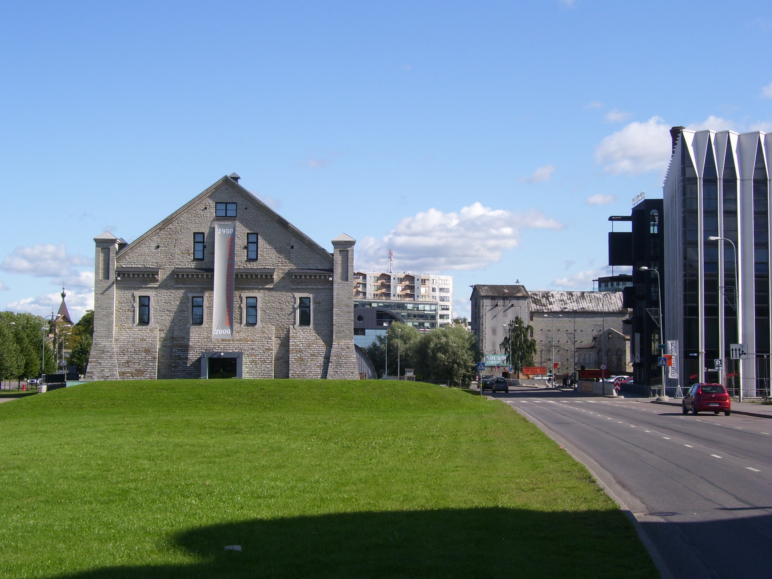 Rottermanni Soolaladu Tallinnas, vaade Ahtri tänava algusest Rottermanni kvartali poole.